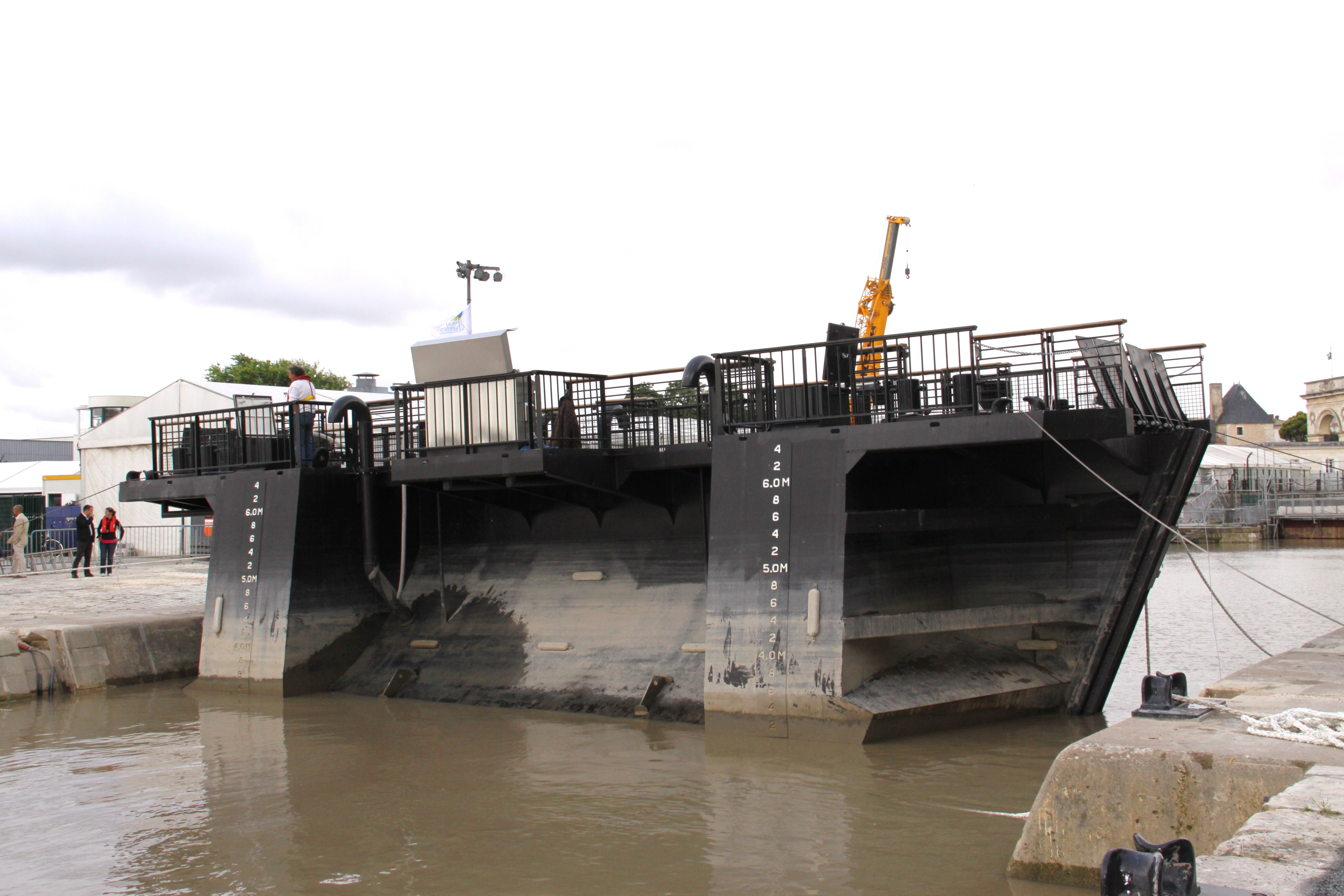 Le bateau-porte est positionné en face de ses rainures et ensuite descendu dans l' eau pour fermer la forme de radoub qui sera vidée. Rochefort-sur-Mer, Charente Maritime, France.